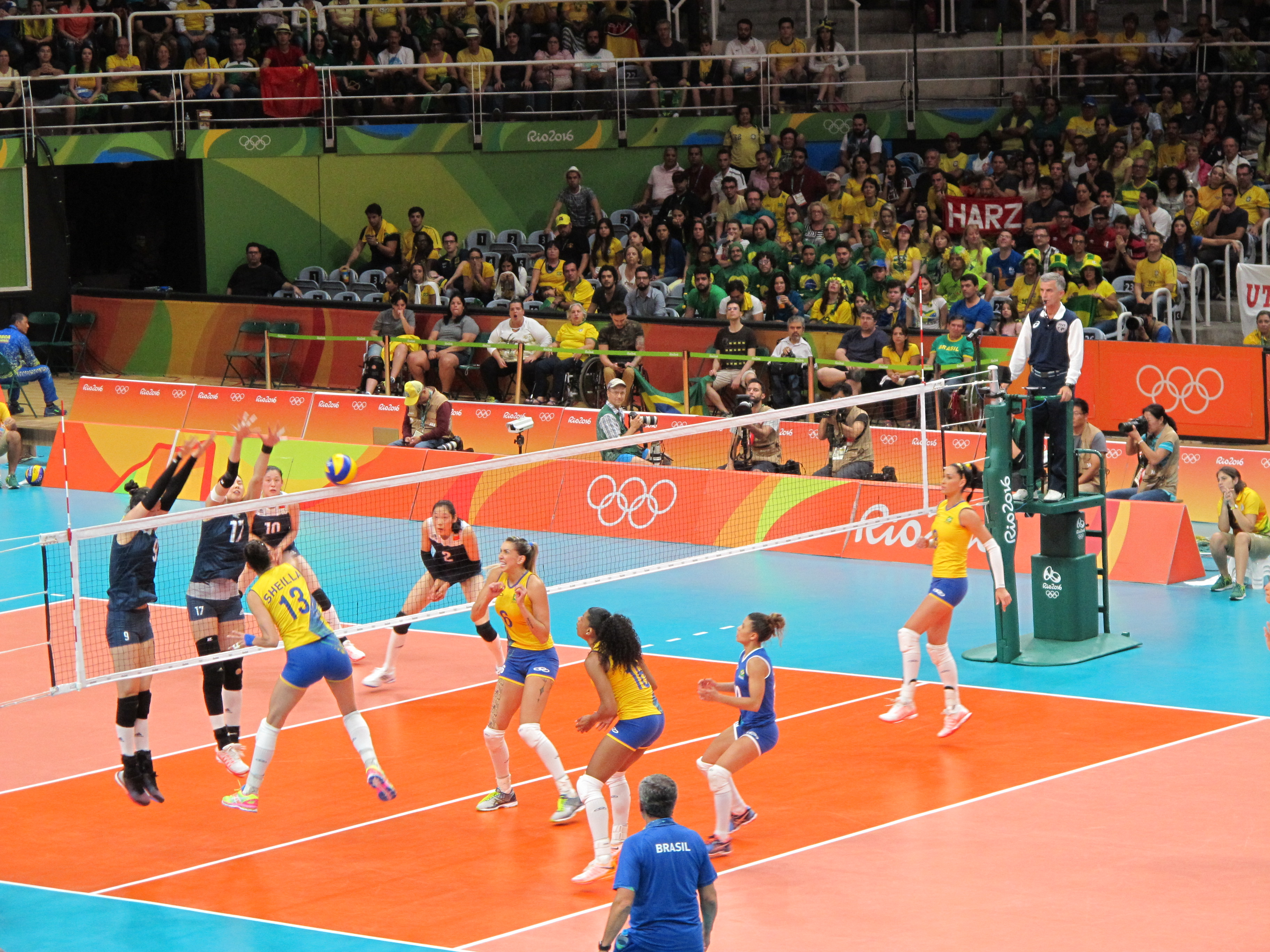 Jogo das quartas de final, Brasil contra a China